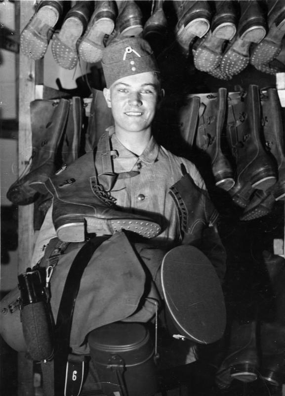 Einkleidung, Stiefelkammer Scherl Bilderdienst Unser Reichsheer. Auf der Kammer! Die neuen Rekruten werden eingekleidet. 20545-35 [Potsdam, Infanterieregiment Nr. 9, 1935]